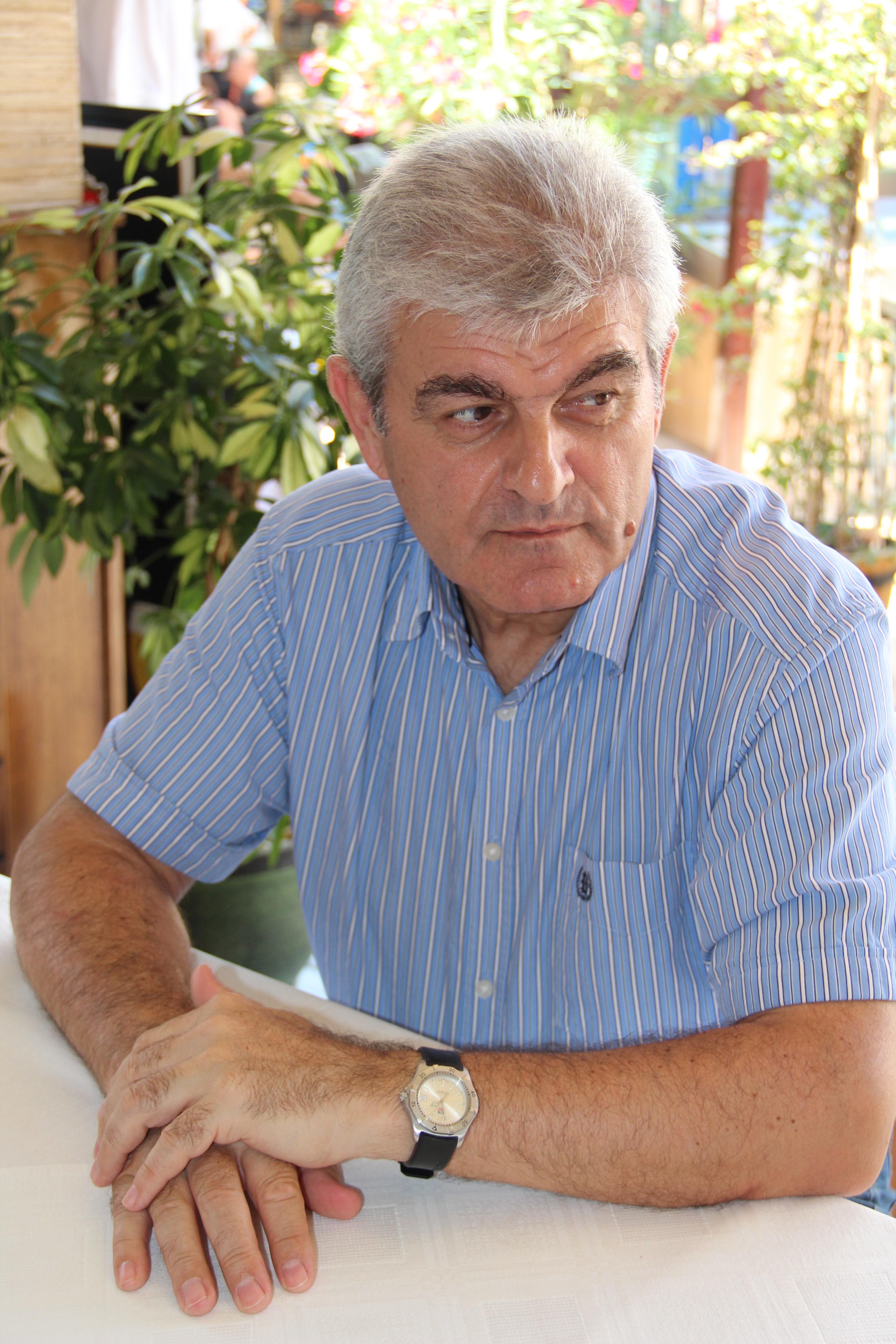 Александр Александров в г. Несебр (Болгария).